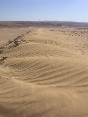 casoy dune in israel, חולות כסוי ליד שחרות.